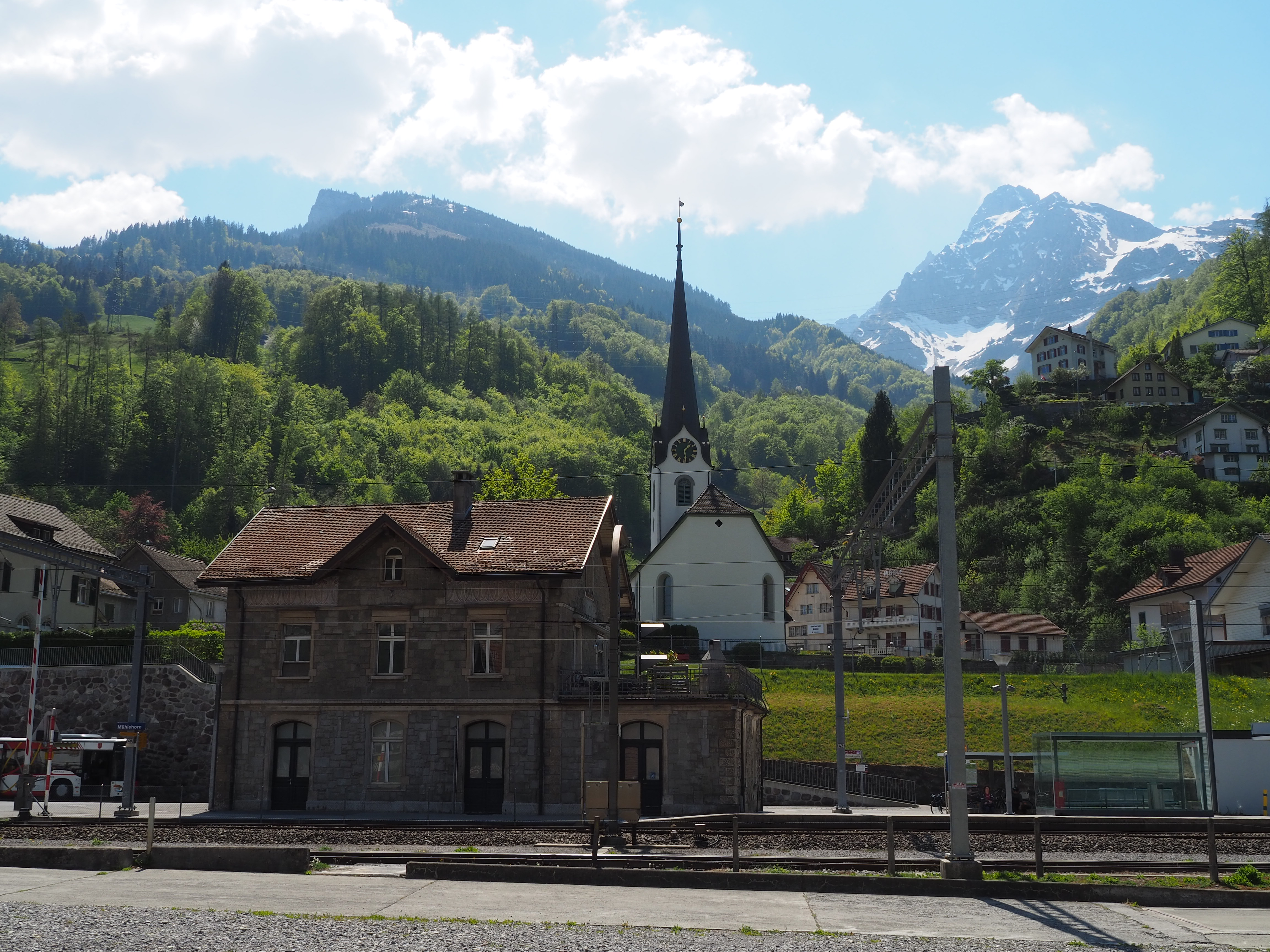 Mühlehorn am Walensee im Glarnerland, Schweiz